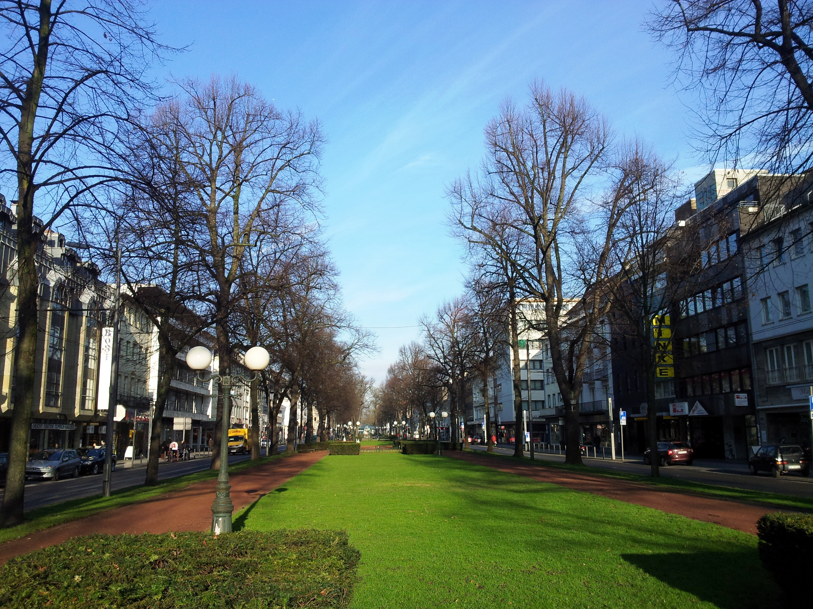 Straße in Krefeld / Street in city of Krefeld (Germany)